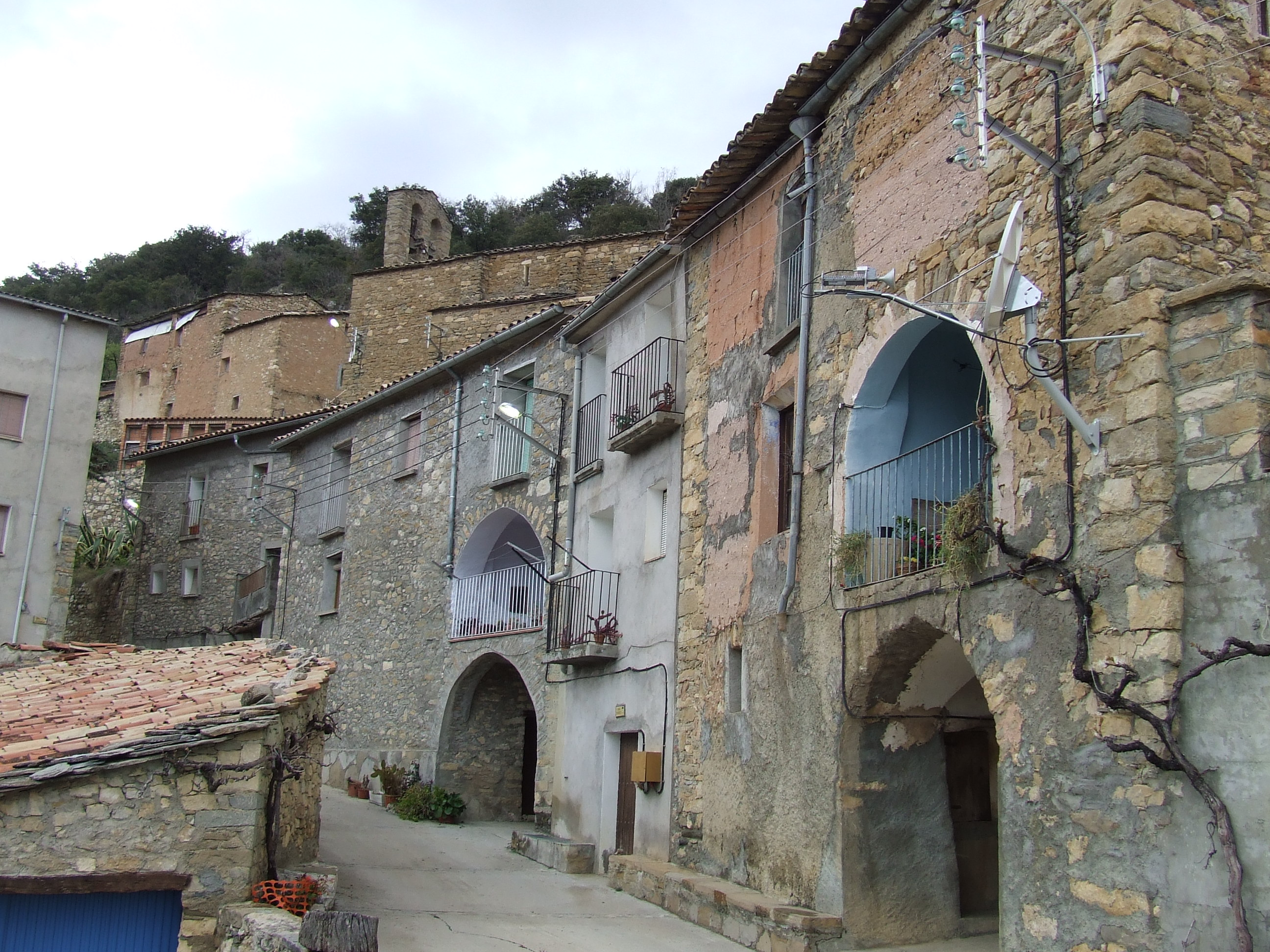 Carrer principal de l'Alzina (Sant Esteve de la Sarga, Pallars Jussà)